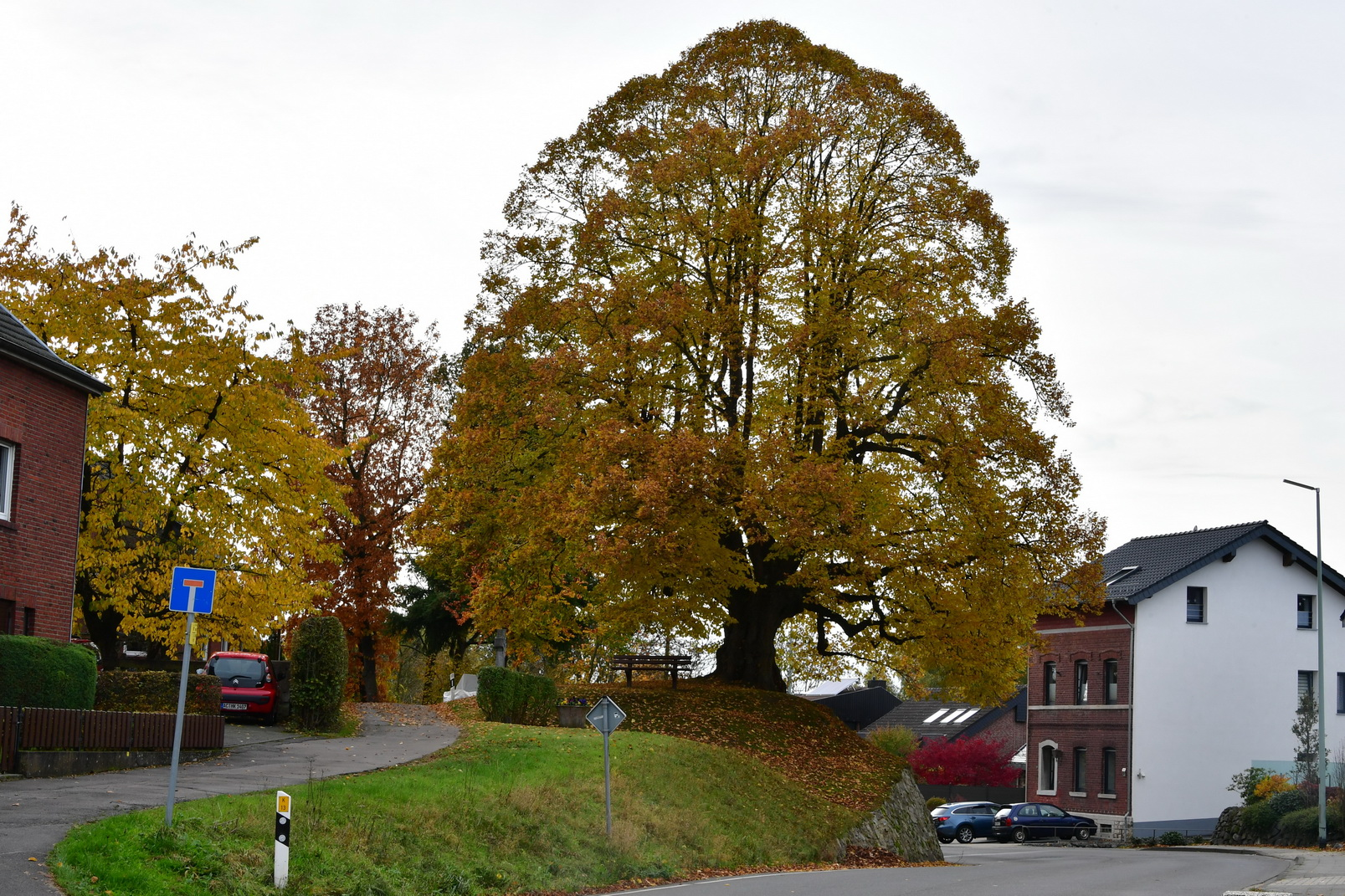 Alte Linde in Stolberg Dorff